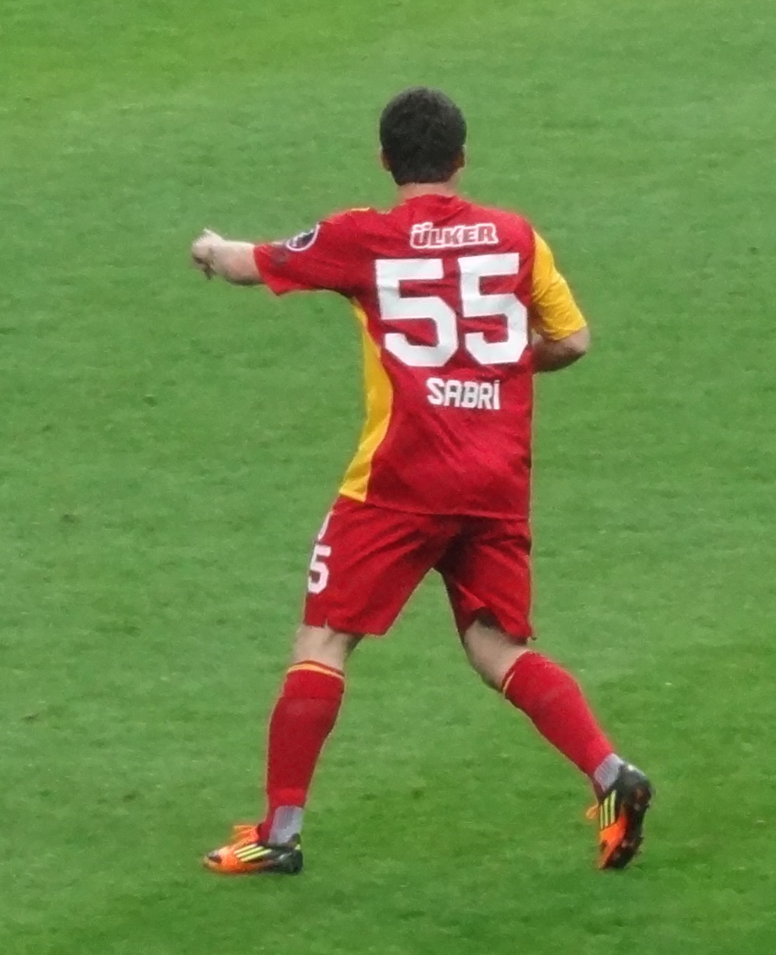 Sabri Sarıoğlu Trabzonspor maçında